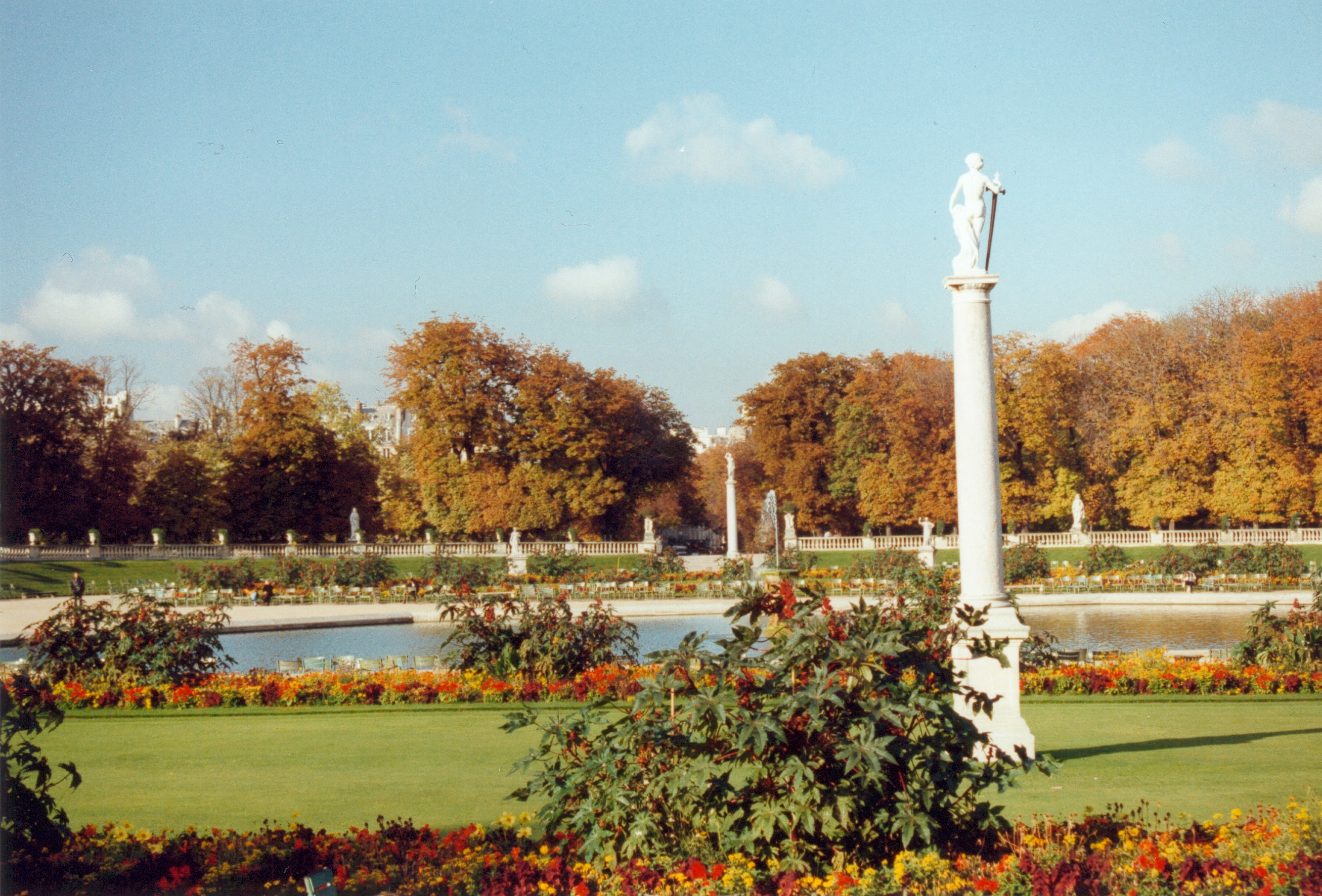 Paris France Le Jardin du Luxembourg